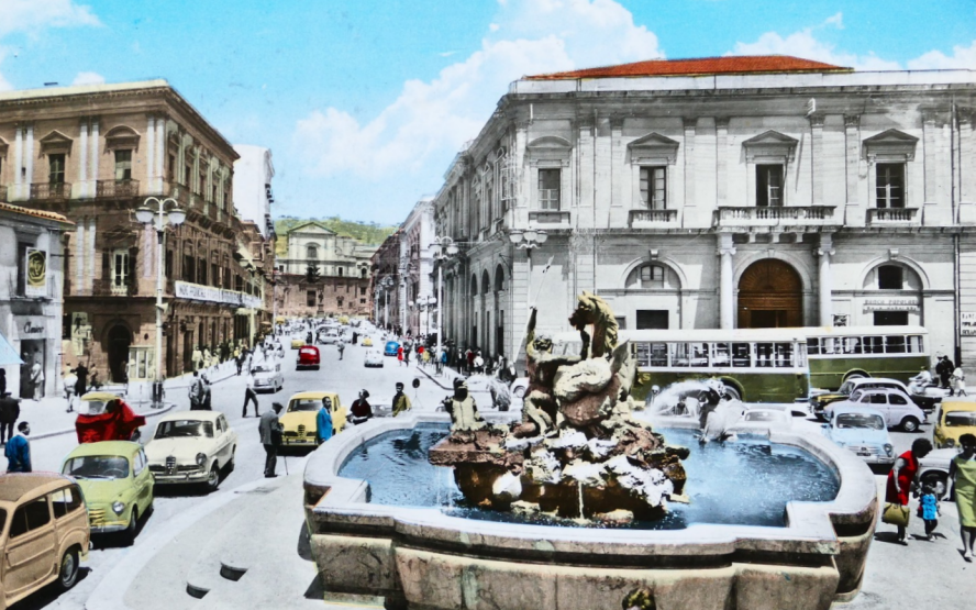 Caltanissetta a colori fontana anni 60